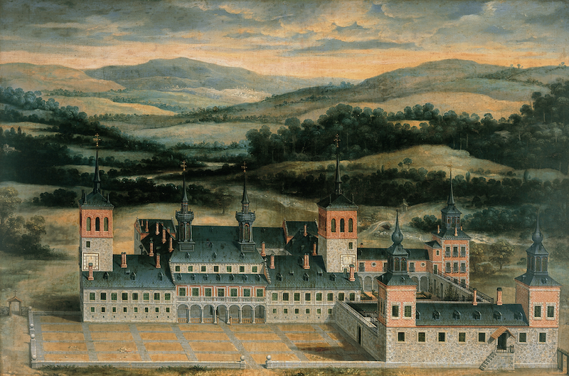 Vista del Palacio de Valsaín (circa 1633), de Félix Castello. Patrimonio Nacional.